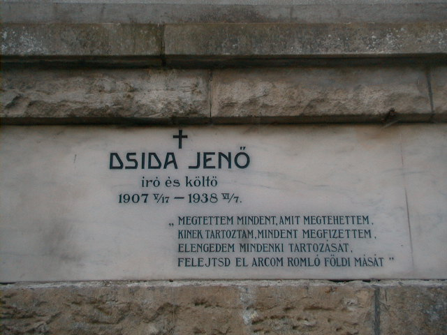 Dsida Jenő sírja Kolozsvárott, a Házsongárdi temetőben. 024